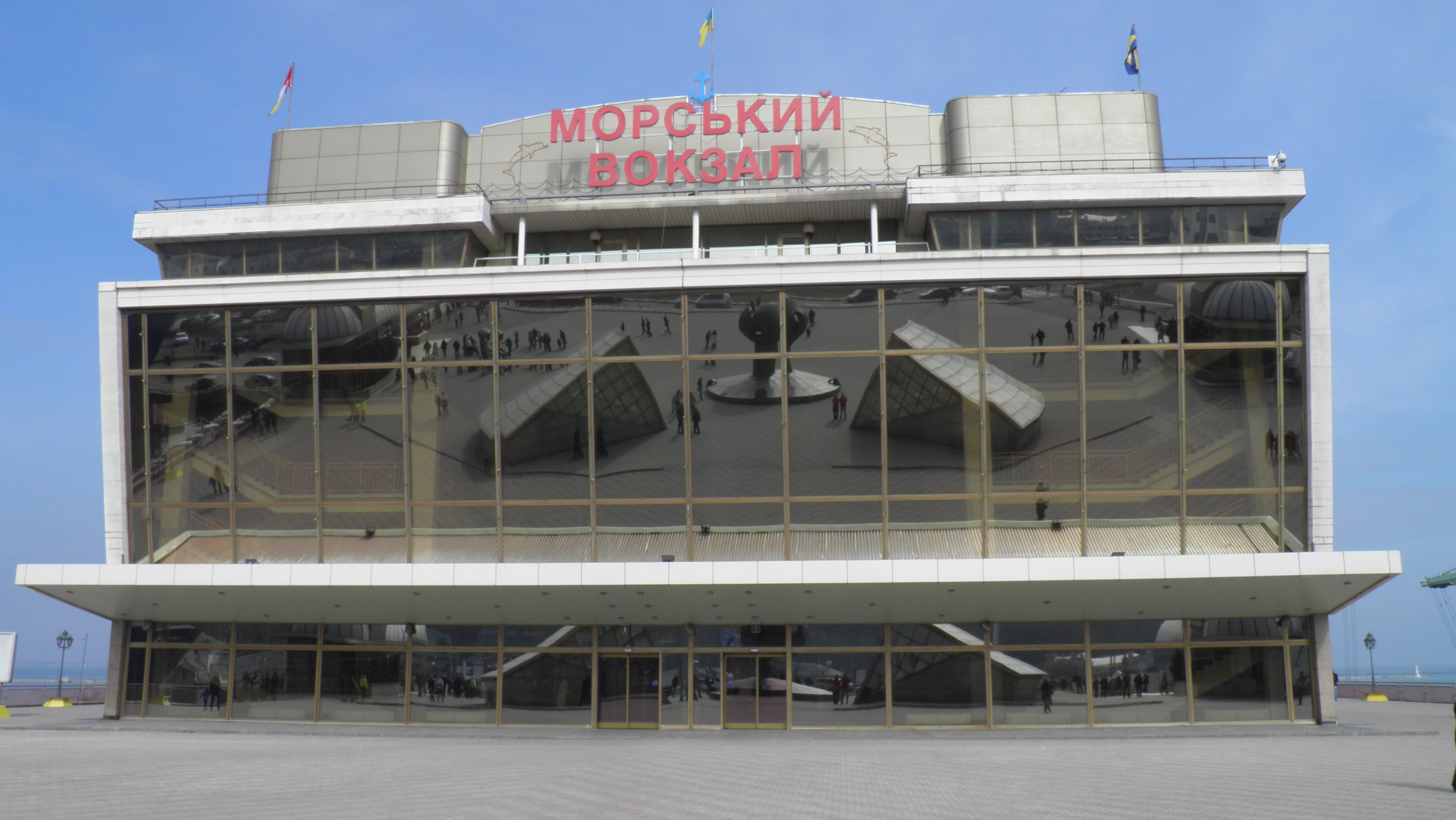 Визначне місце, де:- відбулося закладання перших споруд, які поклали початок будівництву порту і міста Одеси;- відбулося повстання французьких військових моряків, Одеса, Приморська вул., 6, територія Морського вокзалу